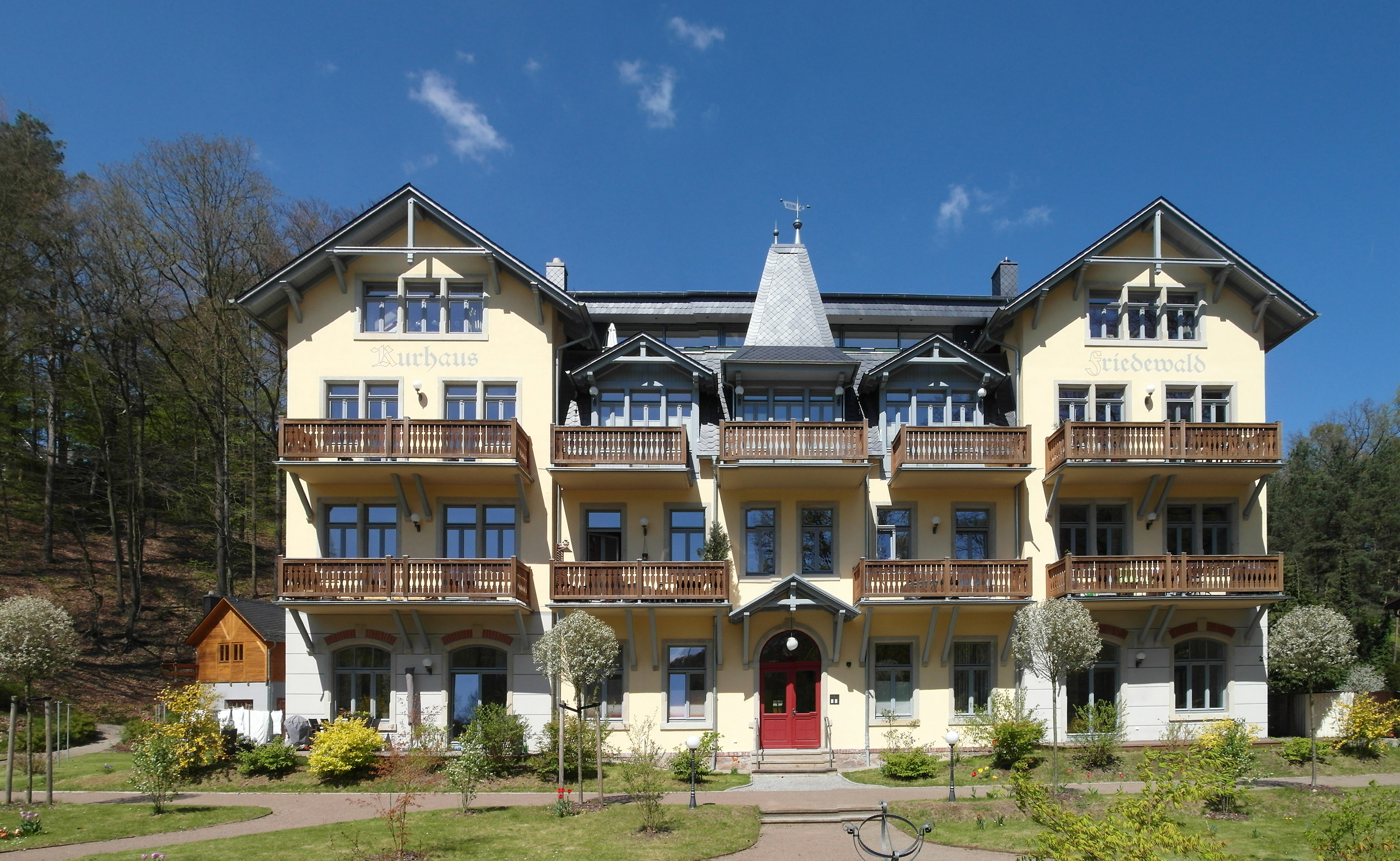 30.04.2017 01468 01468 Friedewald (Moritzburg), Friedewaldstr. 1 (GMP: 51.130621,13.650268): Einstiges „Kurhaus Friedewald“. 2009 noch Ruine, hat es eine wundersame Auferstehung als Wohnhaus erlebt. [SAM9628-9629.JPG]20170430515MDR.JPG(c)Blobelt